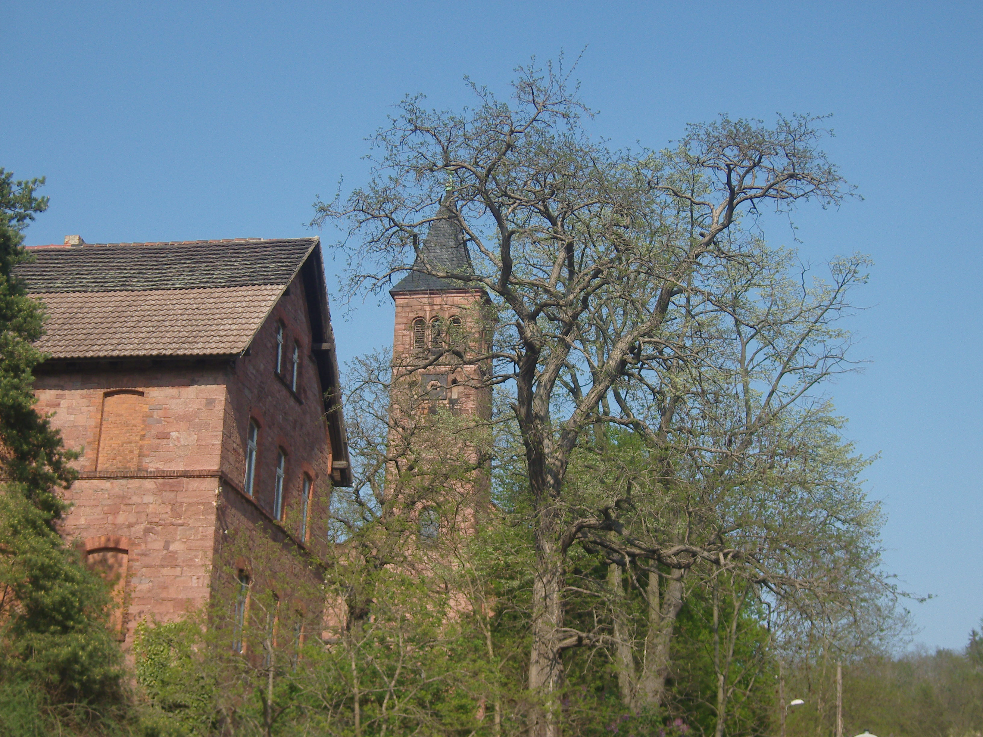 Blick zur Marienkirche von der Friedensstraße in Rothenburg/Saale